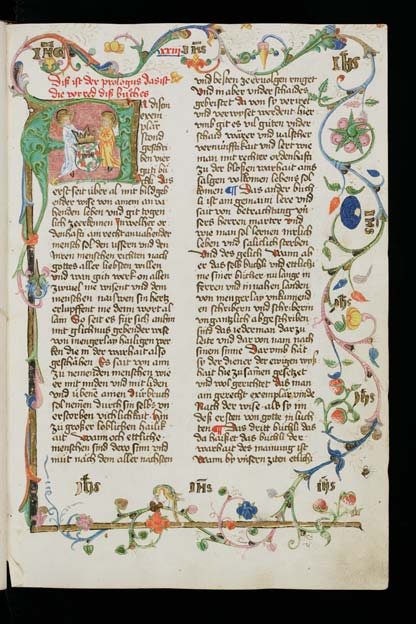 Cod. Eins. 710, Initiale verziert mit Miniaturengel und Blumenranken, F. 23r